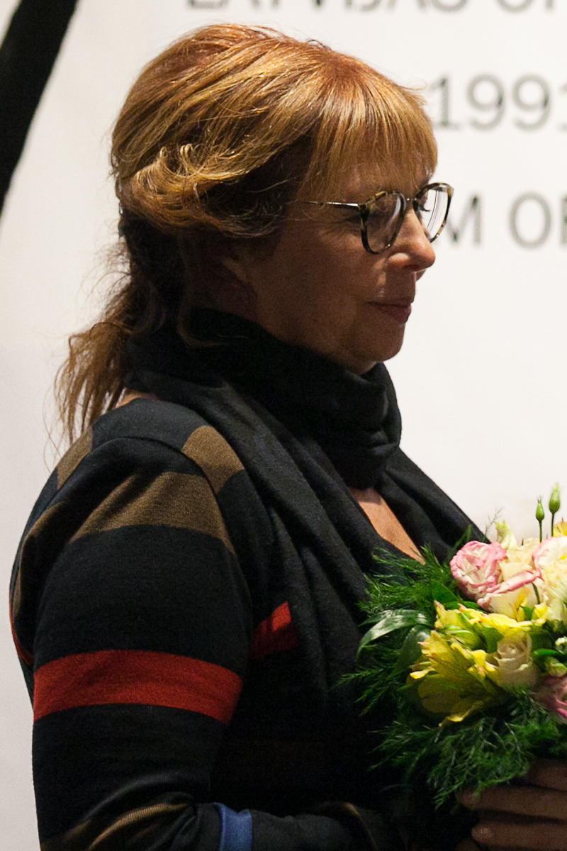 2012.gada 25.javāris. Saeimas priekšsēdētāja Solvita Āboltiņa Okupācijas muzejā noskatās Dzintras Gekas dokumentālo filmu „Gvido Zvaigzne". Foto: Ernests Dinka, Saeimas Kanceleja